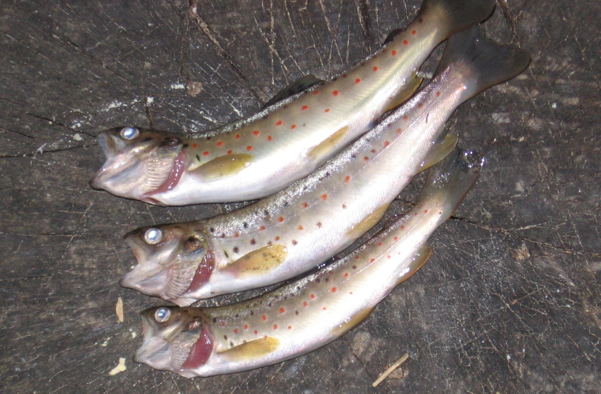 Potočna pastrmka iz Goleme reke